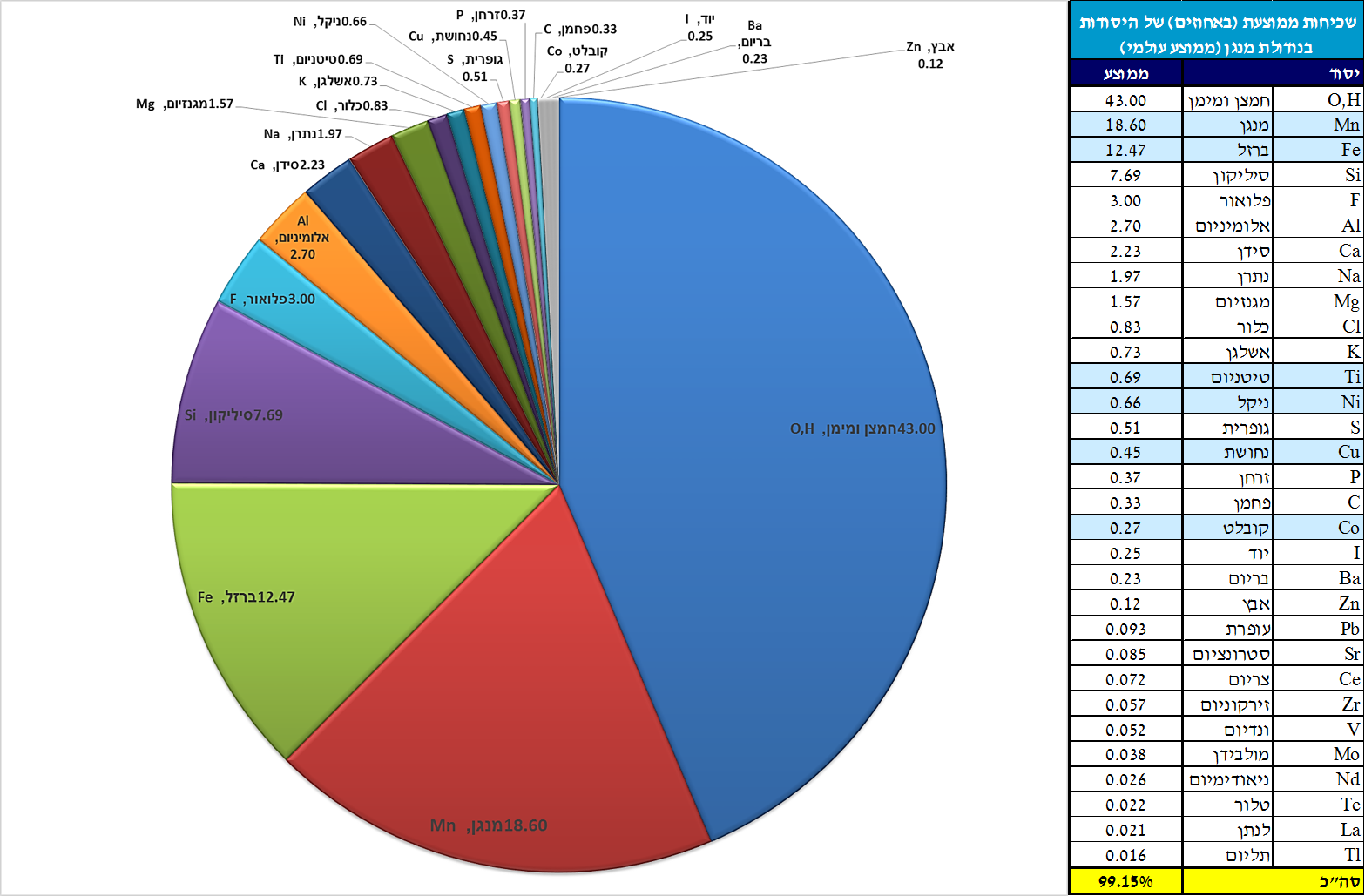 היסודות העיקריים הבונים את נודולות המנגן